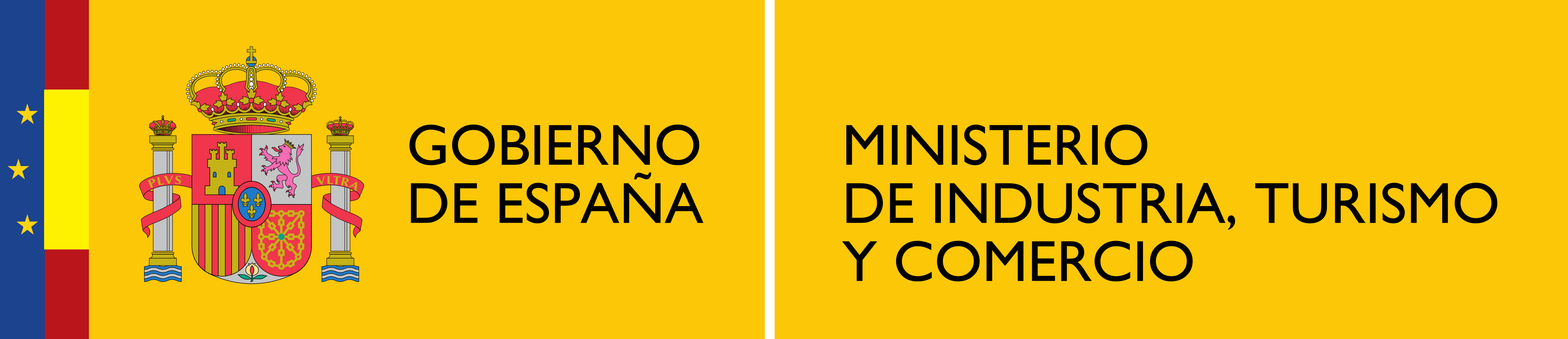 Logotipo del Ministerio de Industria, Turismo y Comercio